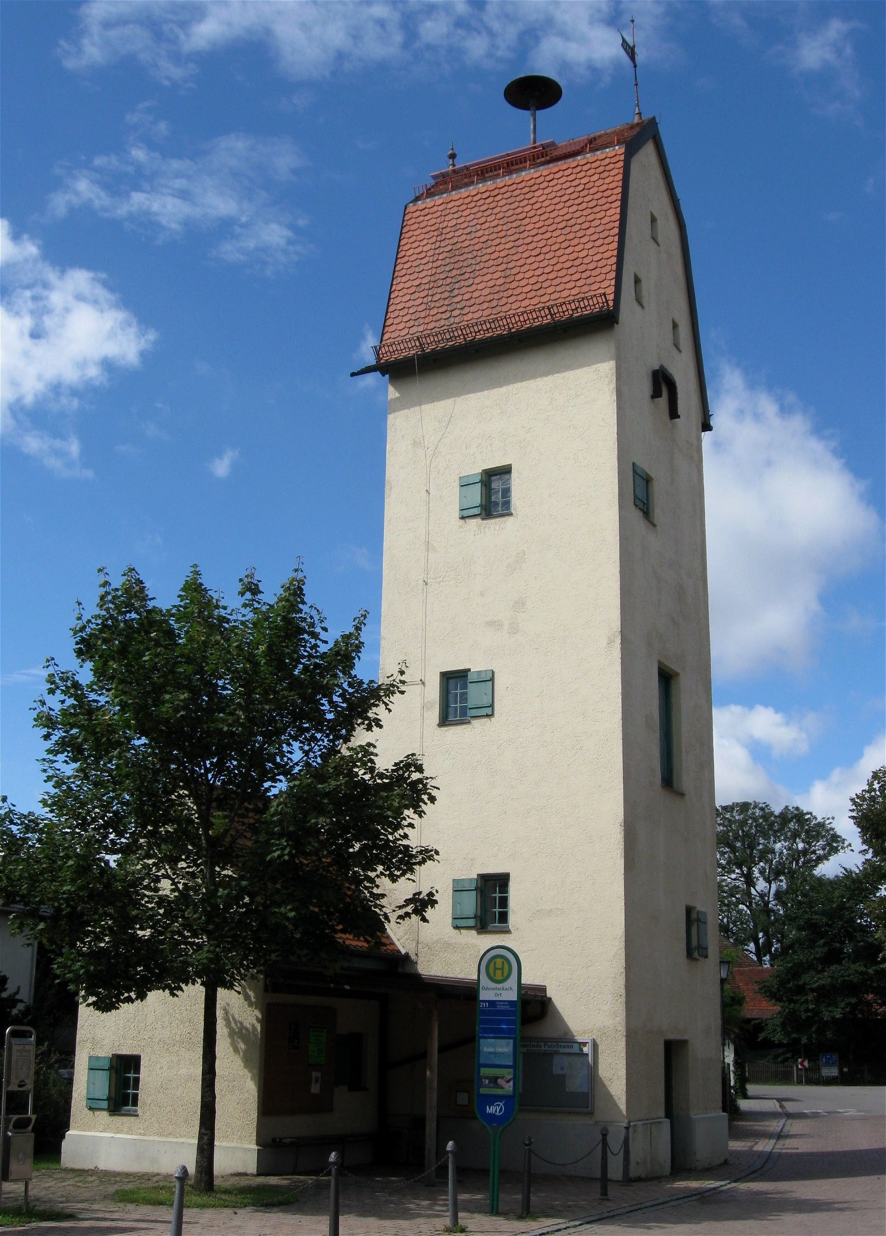 Kapellenplatz, Oedenstockach; Wasserturm, rechteckig, mit gebrochenem Satteldach, Details im barockisierenden Heimatstil, um 1905; mit gleichzeitigen Anbauten. D-1-84-140-4